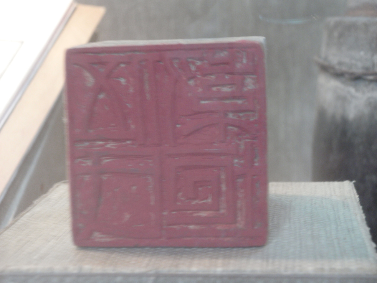 粵語: 伍氏紫垣印章